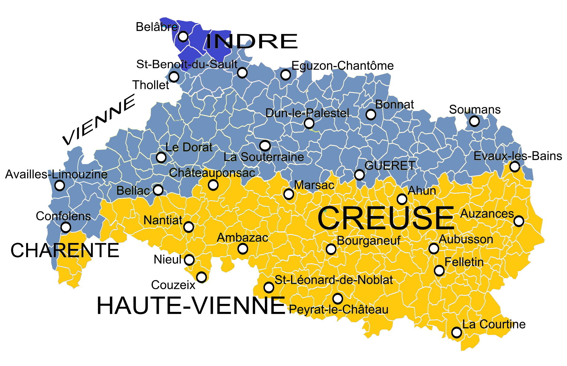 Carte linguistique de la Marche avec présentation des communes du Croissant : Légende Vert : Occitan limousin. Marron : Occitan auvergnat. Beige : Occitan marchois. Dialecte occitan de transition avec le français/langue d'oïl. Bleu : Langue d'oïl/Français (berrichon et/ou poitevin). Sources Dernières recherches universitaires (années 2010) sur le domaine marchois : Maximilien Guérin (université de Poitiers), Laurène Barbier, Nicolas Quint (CNRS).